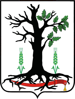 Герб Стародубского района, Брянская область